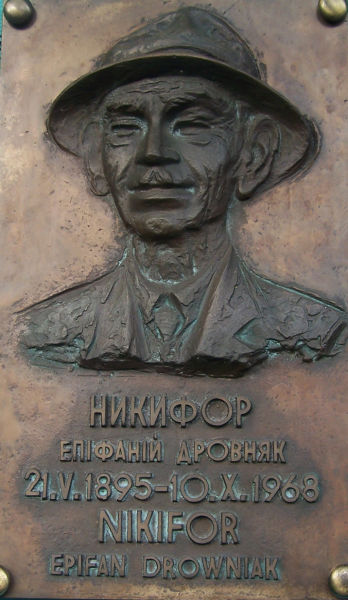 Nikifor Krynicki (Krynica-Zdrój)